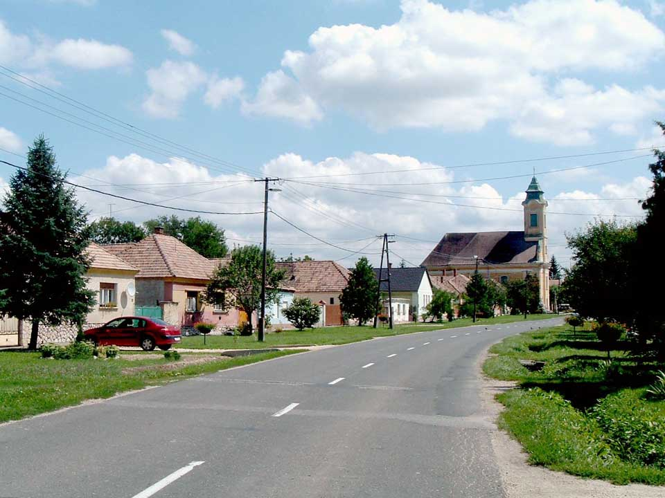 Béb, Hungary - Szent Anna római katolikus templom